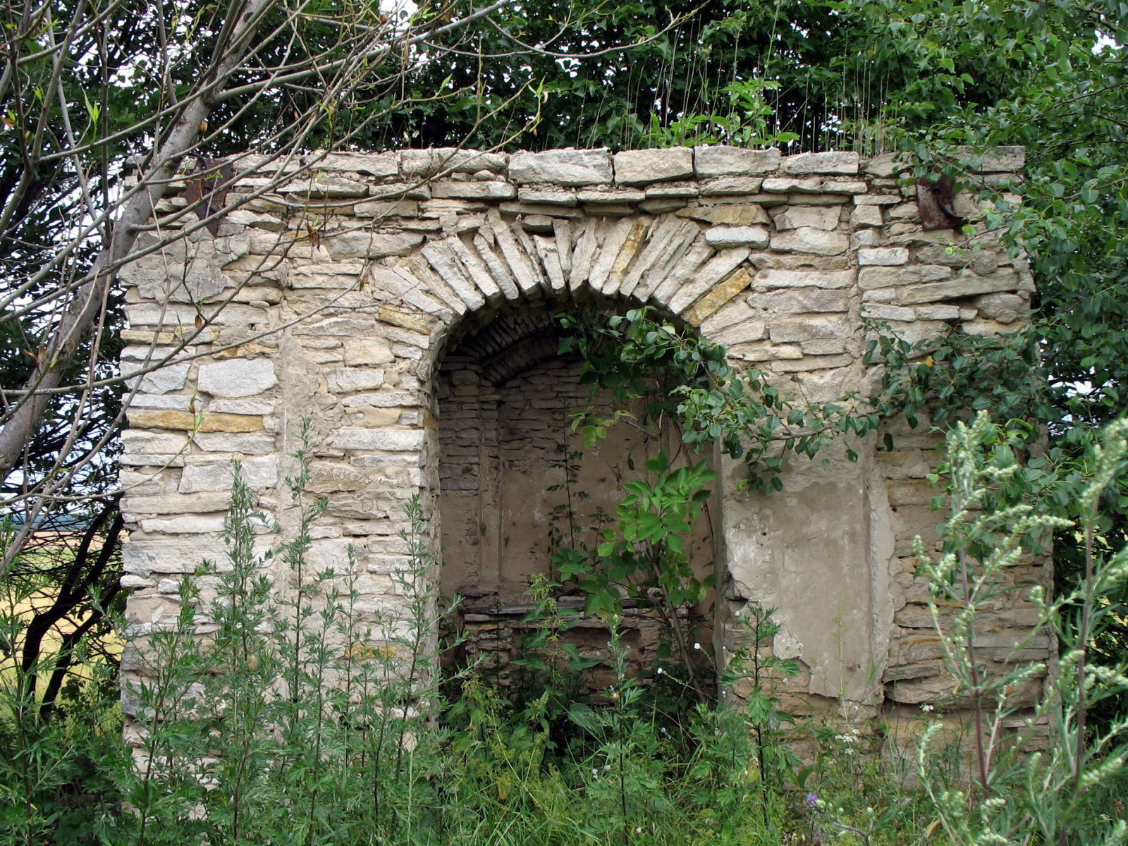 Radruż (Poland)